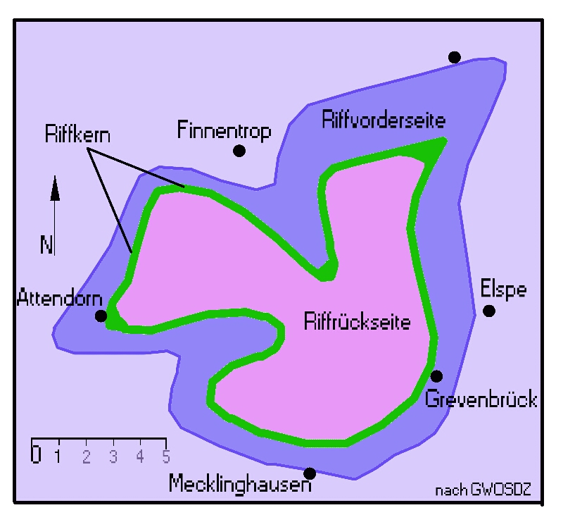 Rekonstruktion der ursprünglichen Form des Attendorn-Elsper Riffs nach GWOSDZ 1972